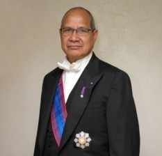 Justino Guterres, osttimoresischer Botschafter beim Heiligen Stuhl, ausgezeichnet mit dem Piusorden